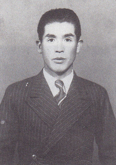 日本競馬会調教師・大久保石松